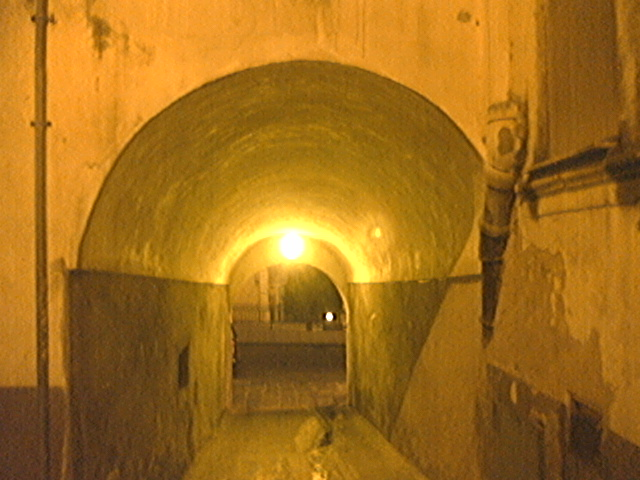 Un cunnuttu , condotto , strada tipica presente a Licodia Eubea.